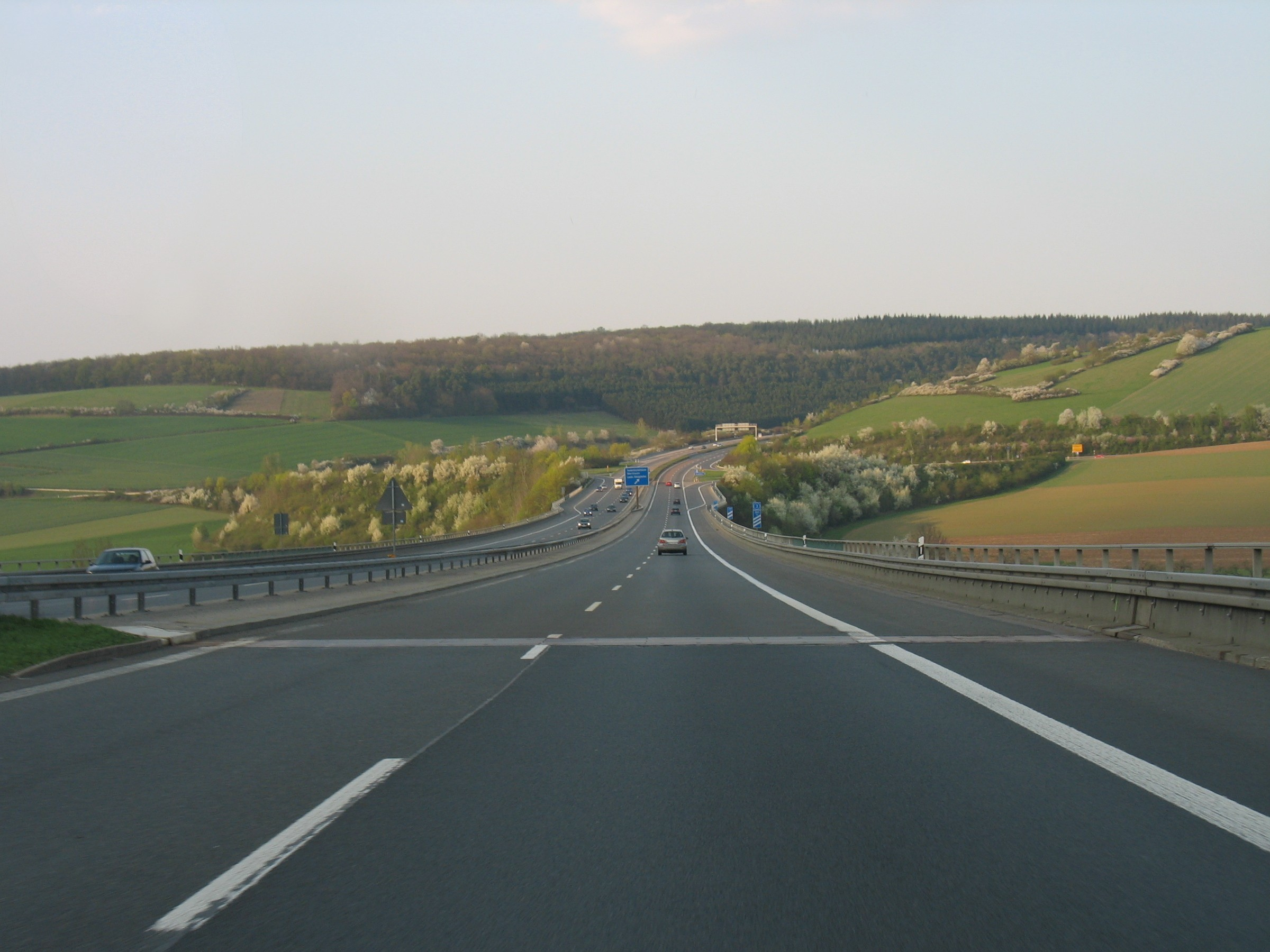 BAB 81, Fahrtrichtung Nord, kurz vor der Taubertalbrücke.